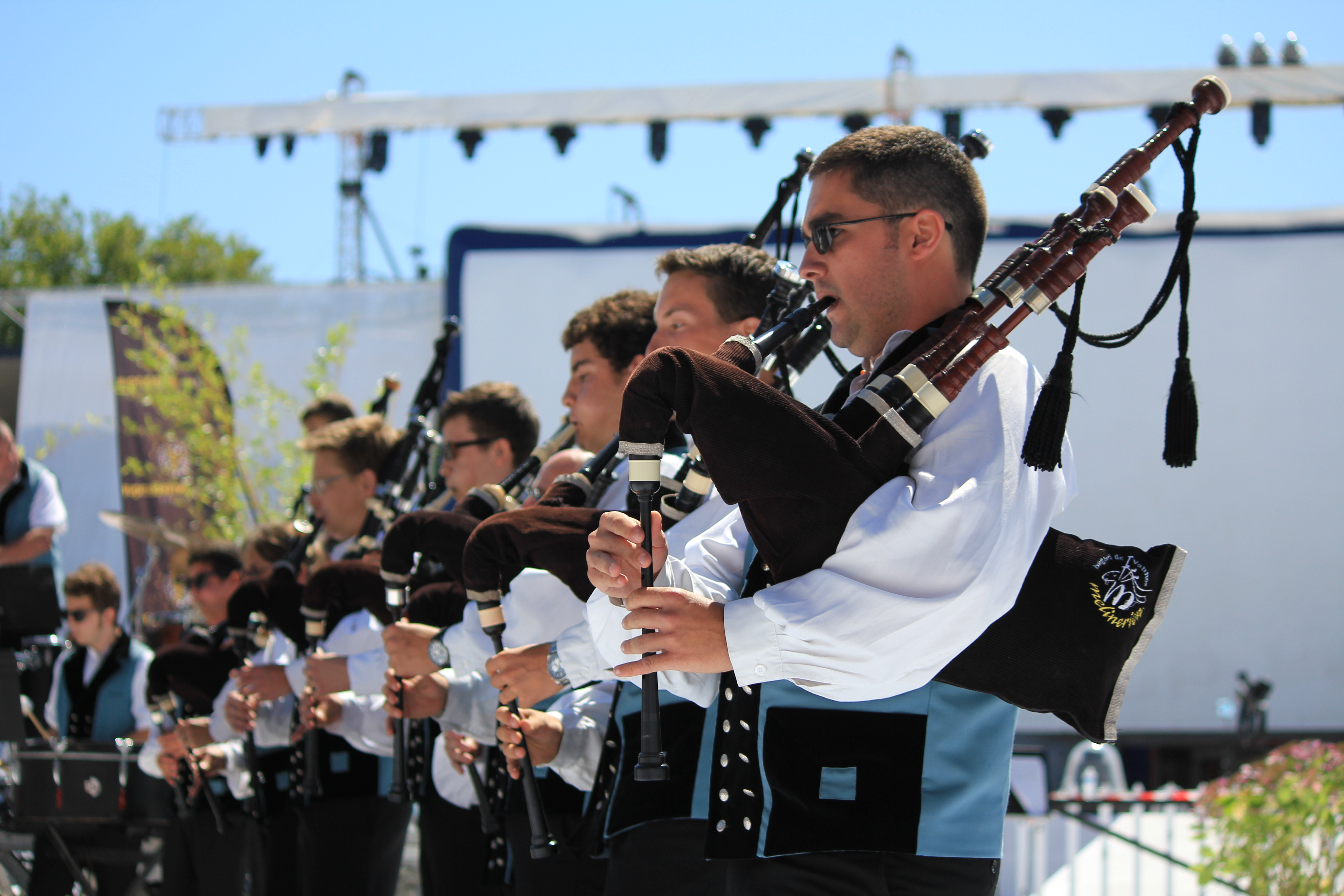 Le Bagad Melinerion lors de l'épreuve d'été du championnat national des bagadoù, organisé dans le cadre du festival interceltique de Lorient 2014.